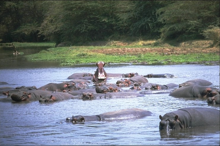 Hippopotamus - Lake Manyara National Park - Tanzania - 1996